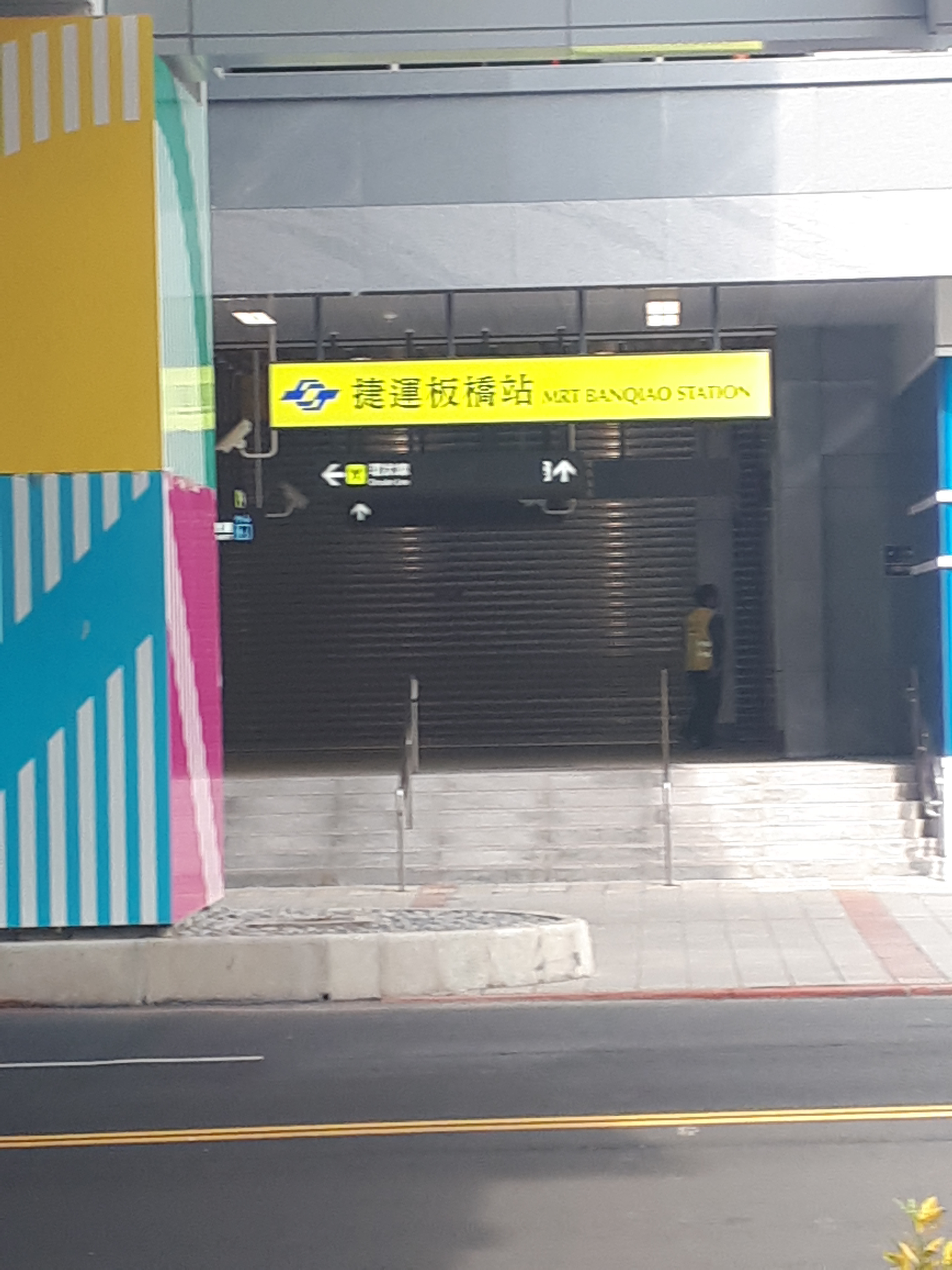 環狀線板橋站出口